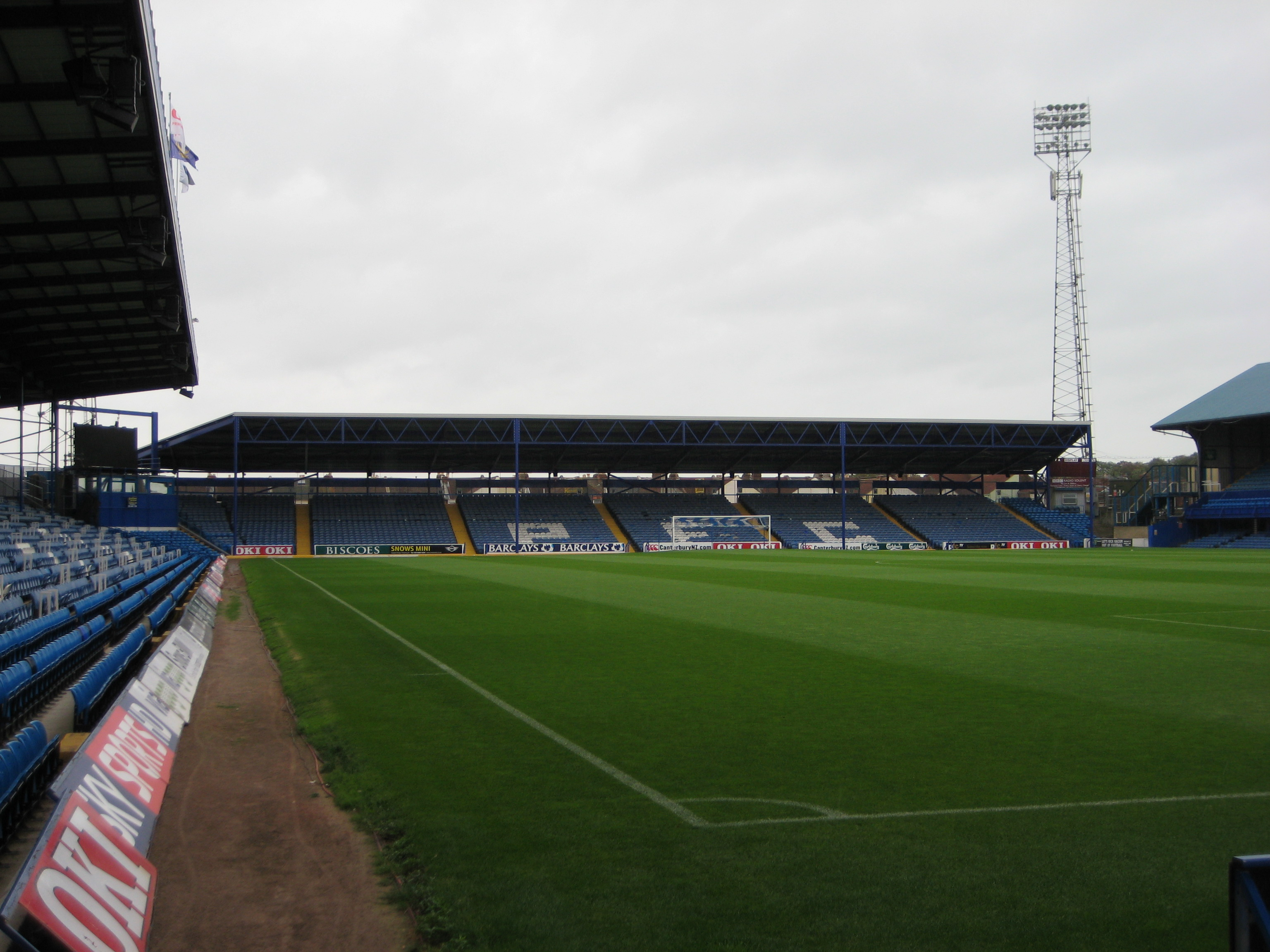 Fratton Park